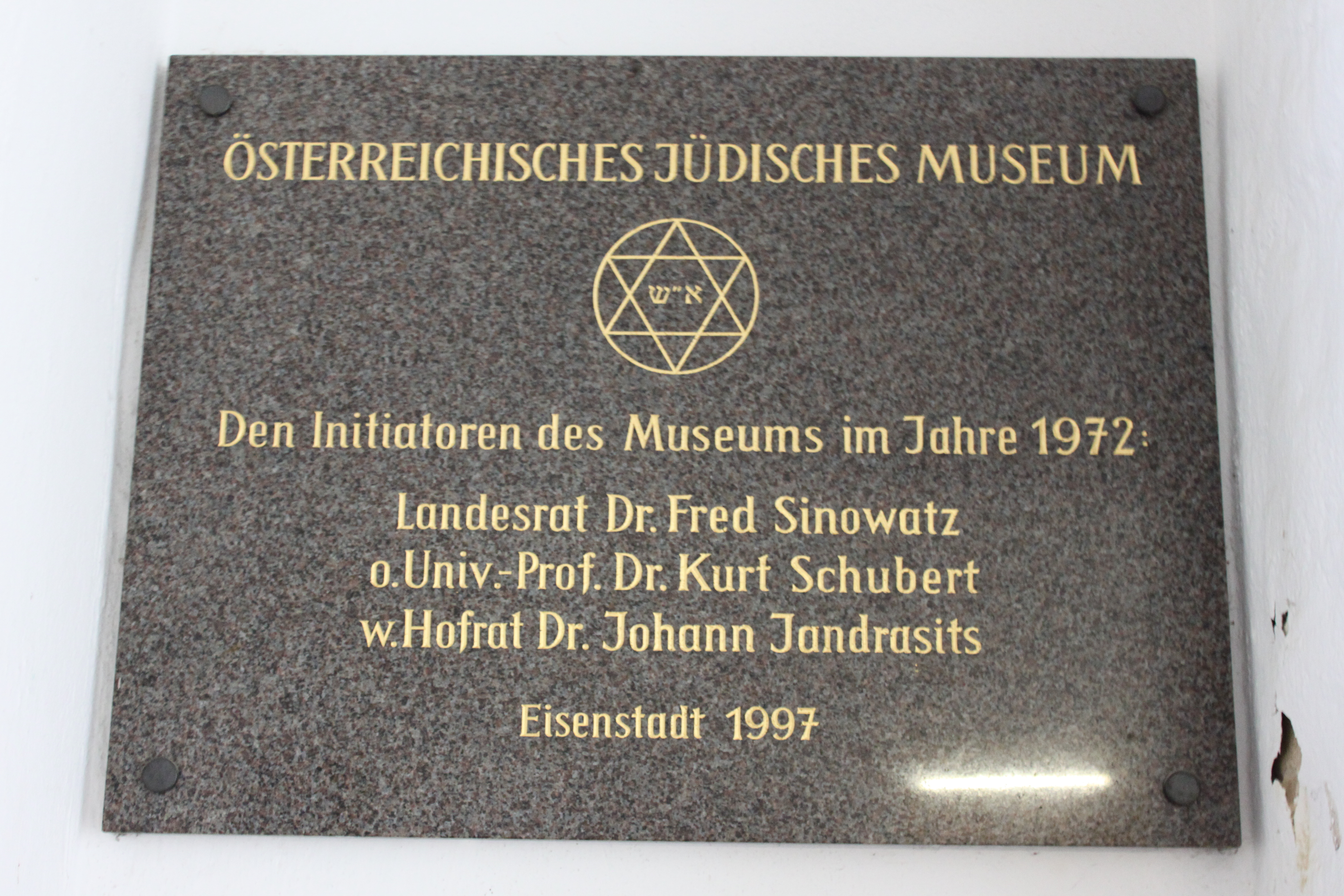 Synagoge, Jüdisches Museum, Wertheimerhaus, Gedenktafel im Eingangsgang